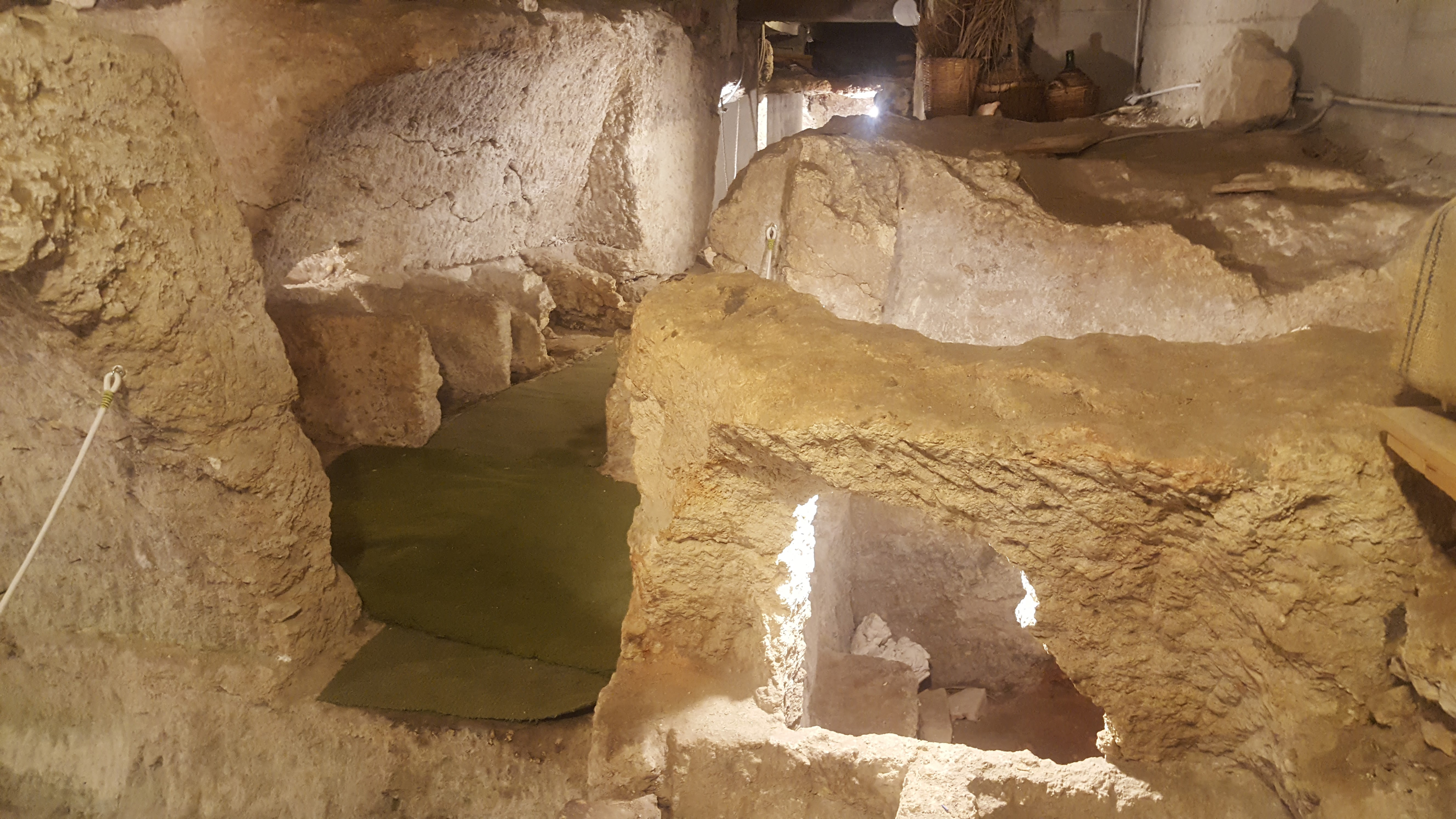 Passaggio dal primo al seondo ipogeo